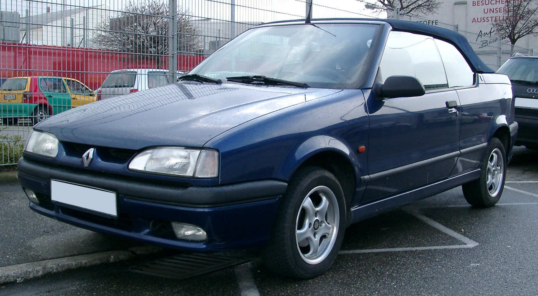 Renault 19 II Cabriolet